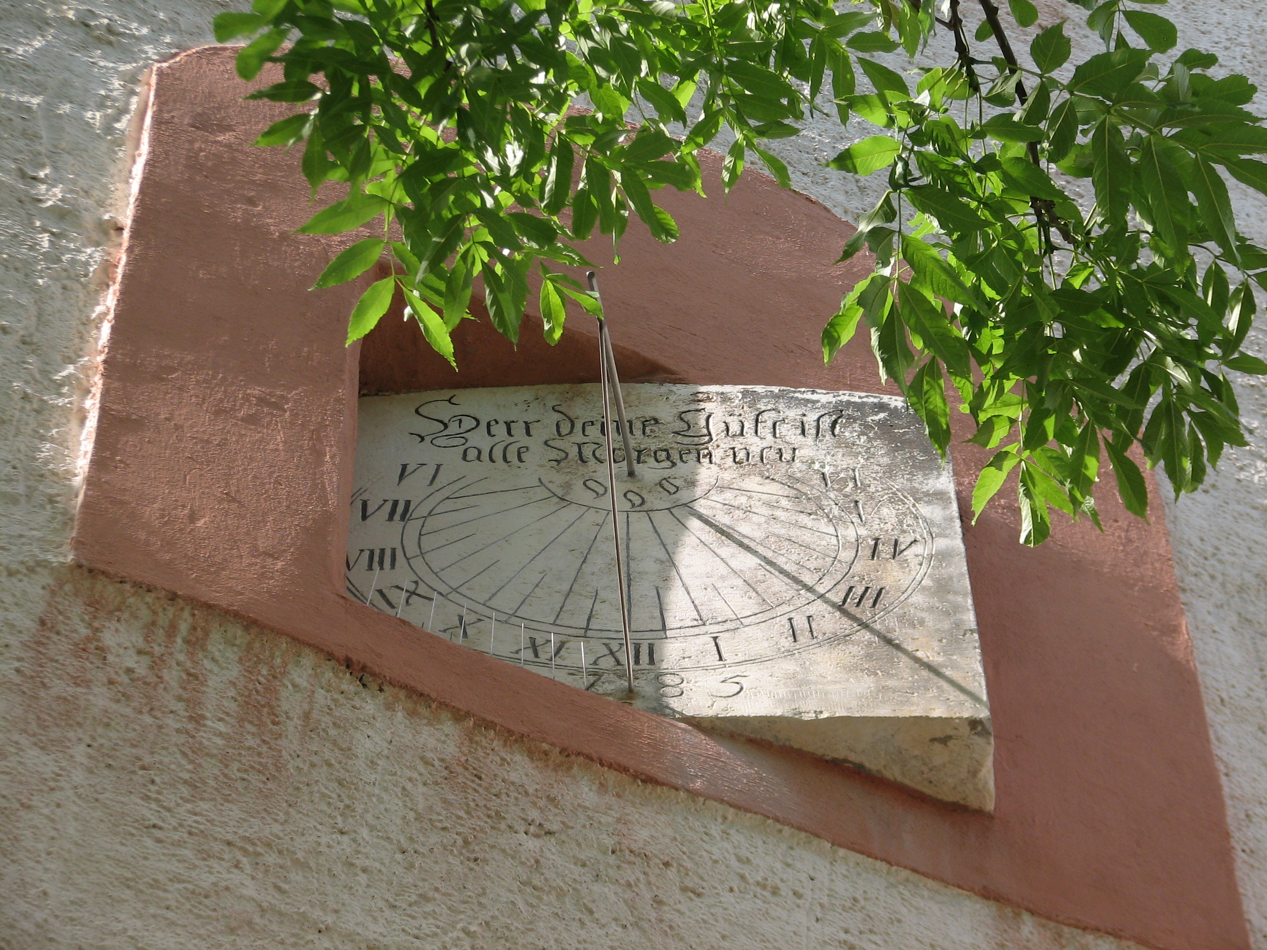 Sonnenuhr Kirche Gerichshain